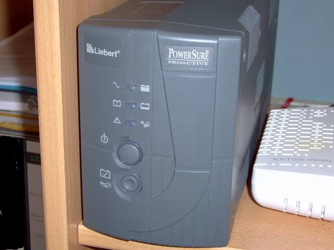 Eine Offline-USV Sonstiges: Eine USV, wie es sie billig z.B. in eBay zu kaufen gibt.